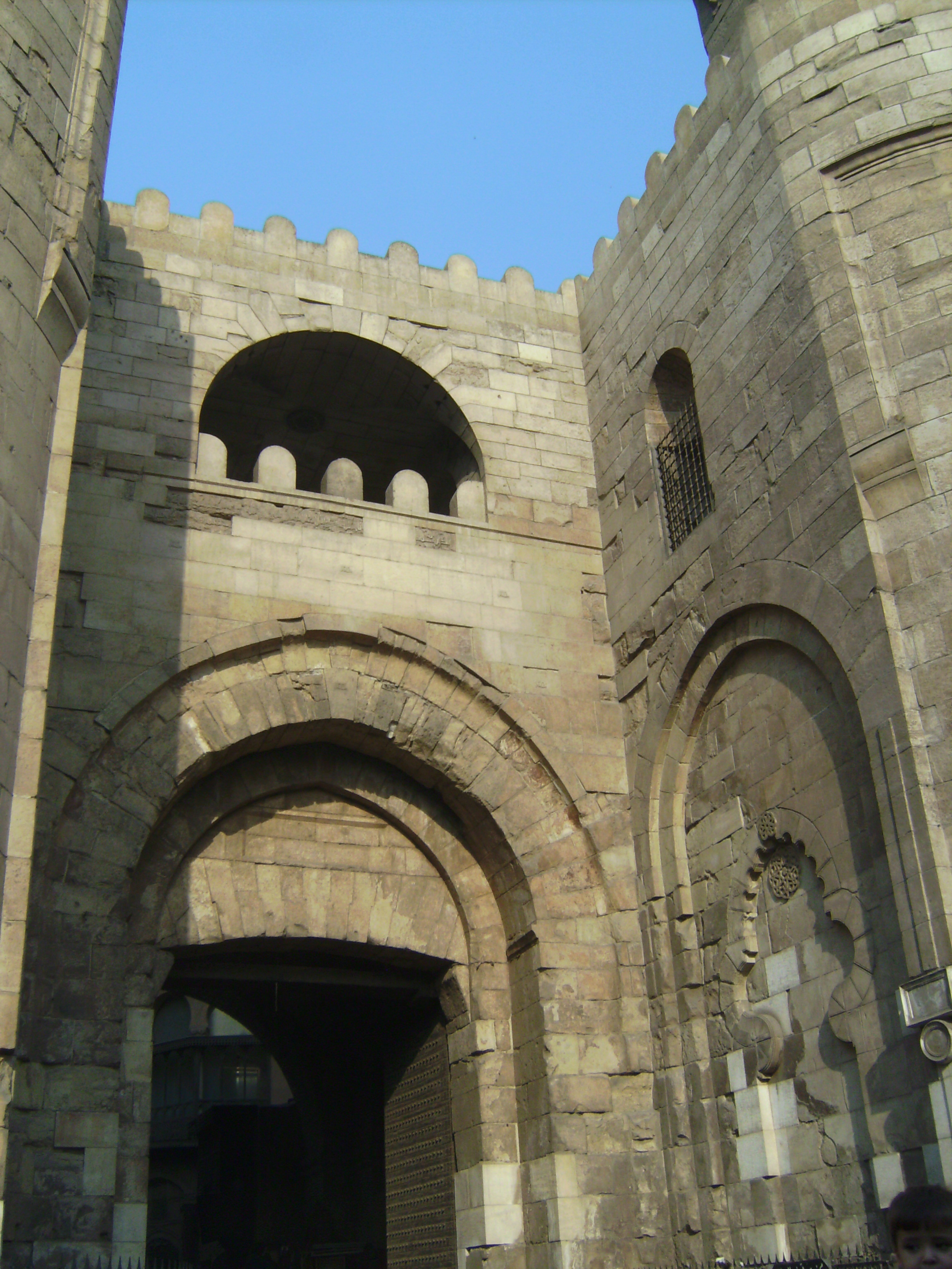 باب زويلة أحد ابواب القاهرة القديمة